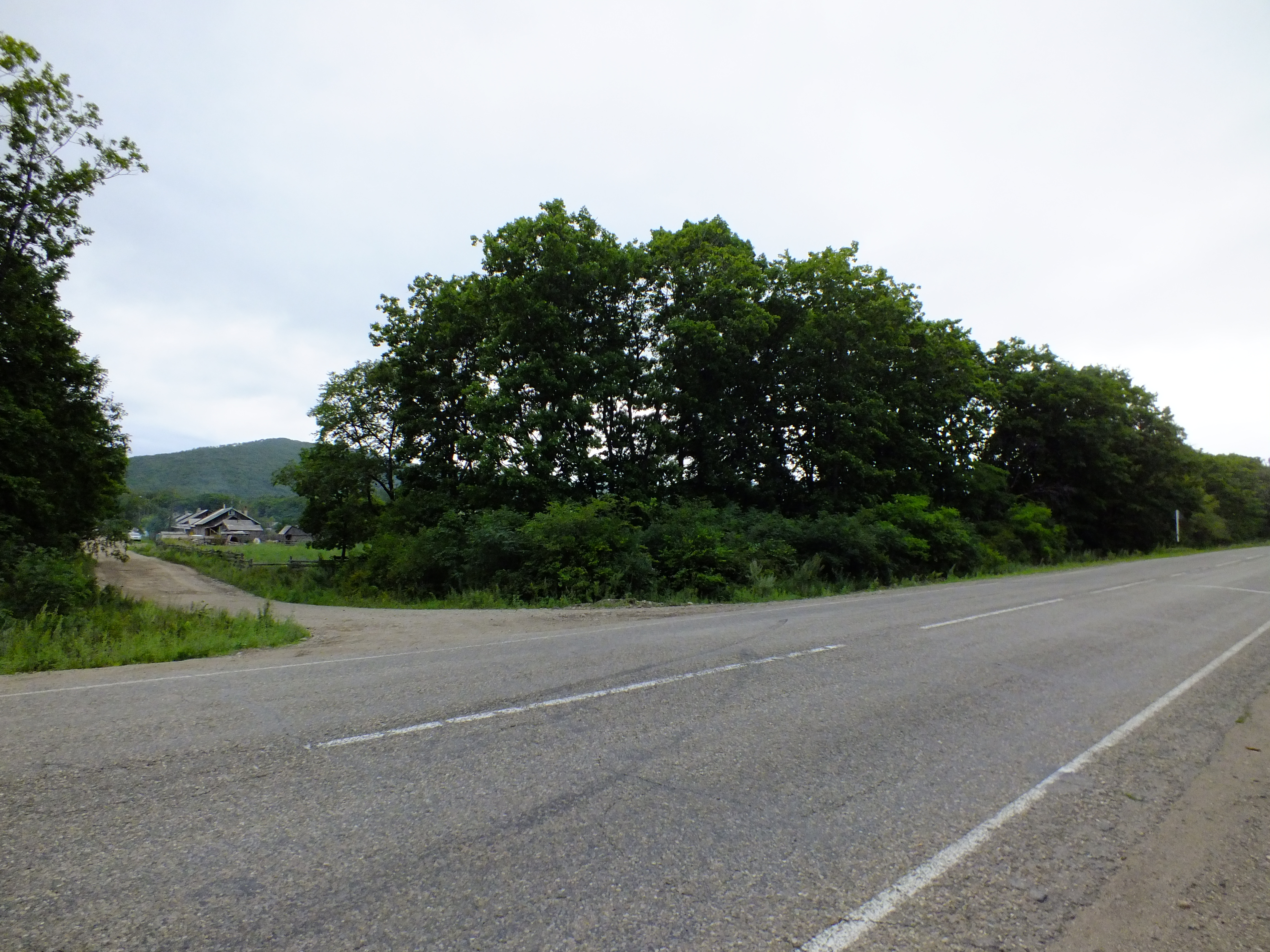 Kavalerovo, Primorsky Krai